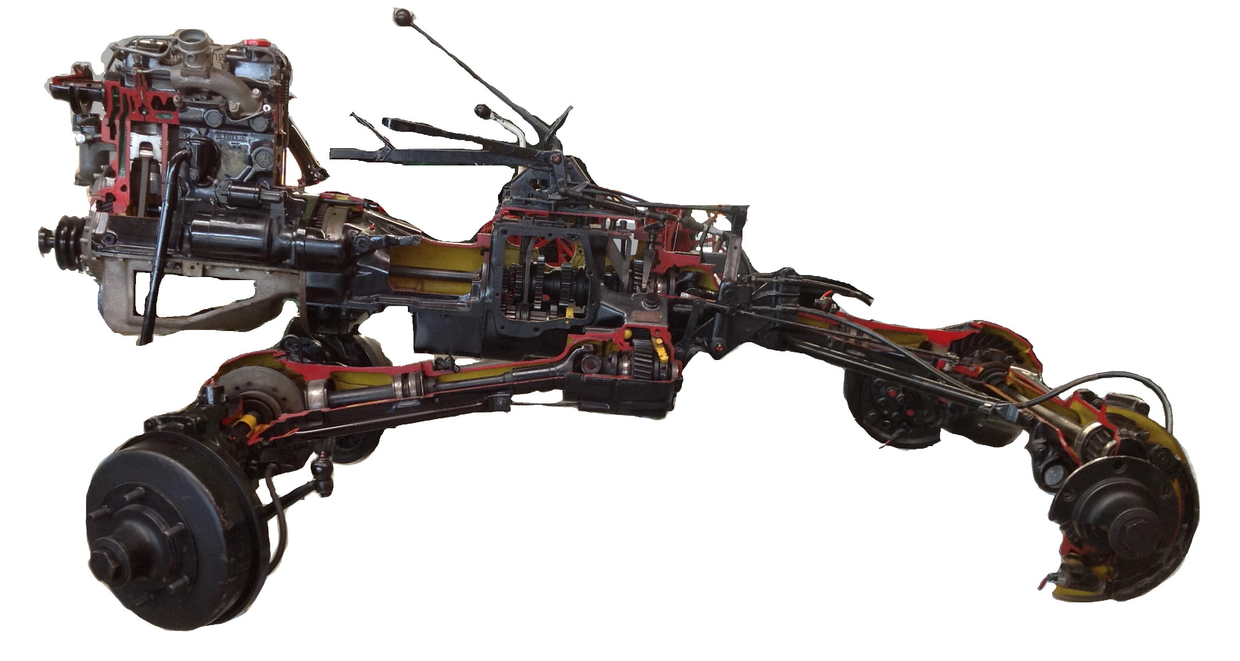 Antriebsstrang des Unimog 2010